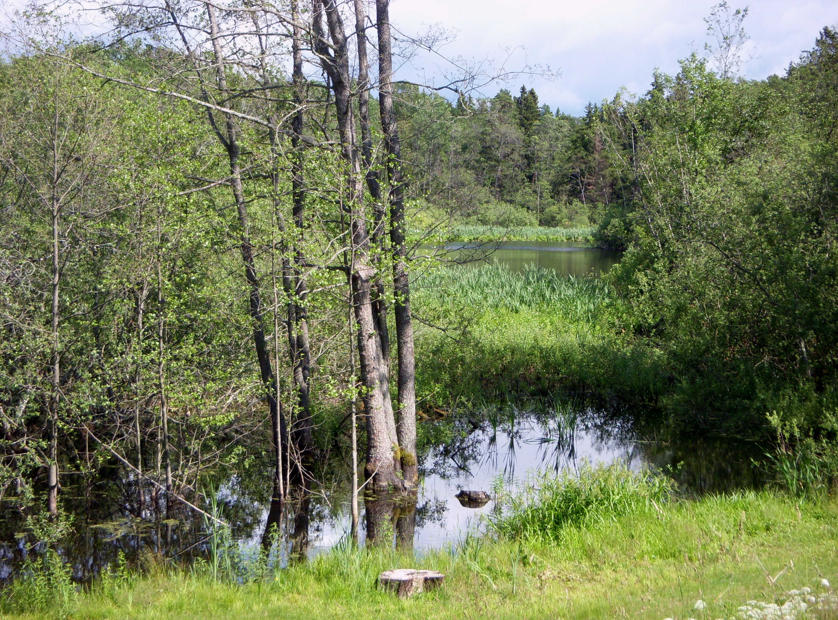 Skogsö träsk i Skogsö naturresrevat